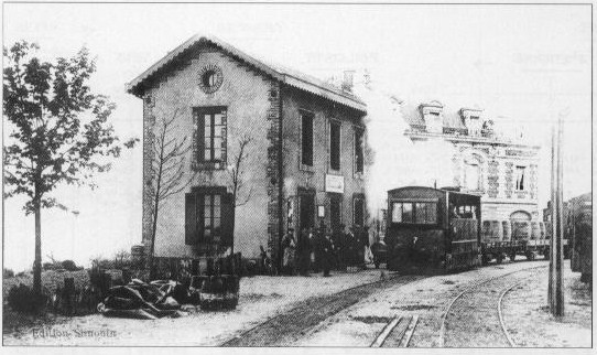 Verzy, dans la Marne, gare CBR et locomotive N°7 avec un bâtiment voyageur de type_1a.